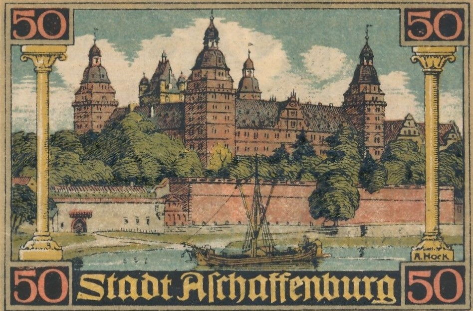 Adalbert Hock, Ansicht Schloss Johannisburg auf 50 Pfennig Notgeld Aschaffenburg 1921